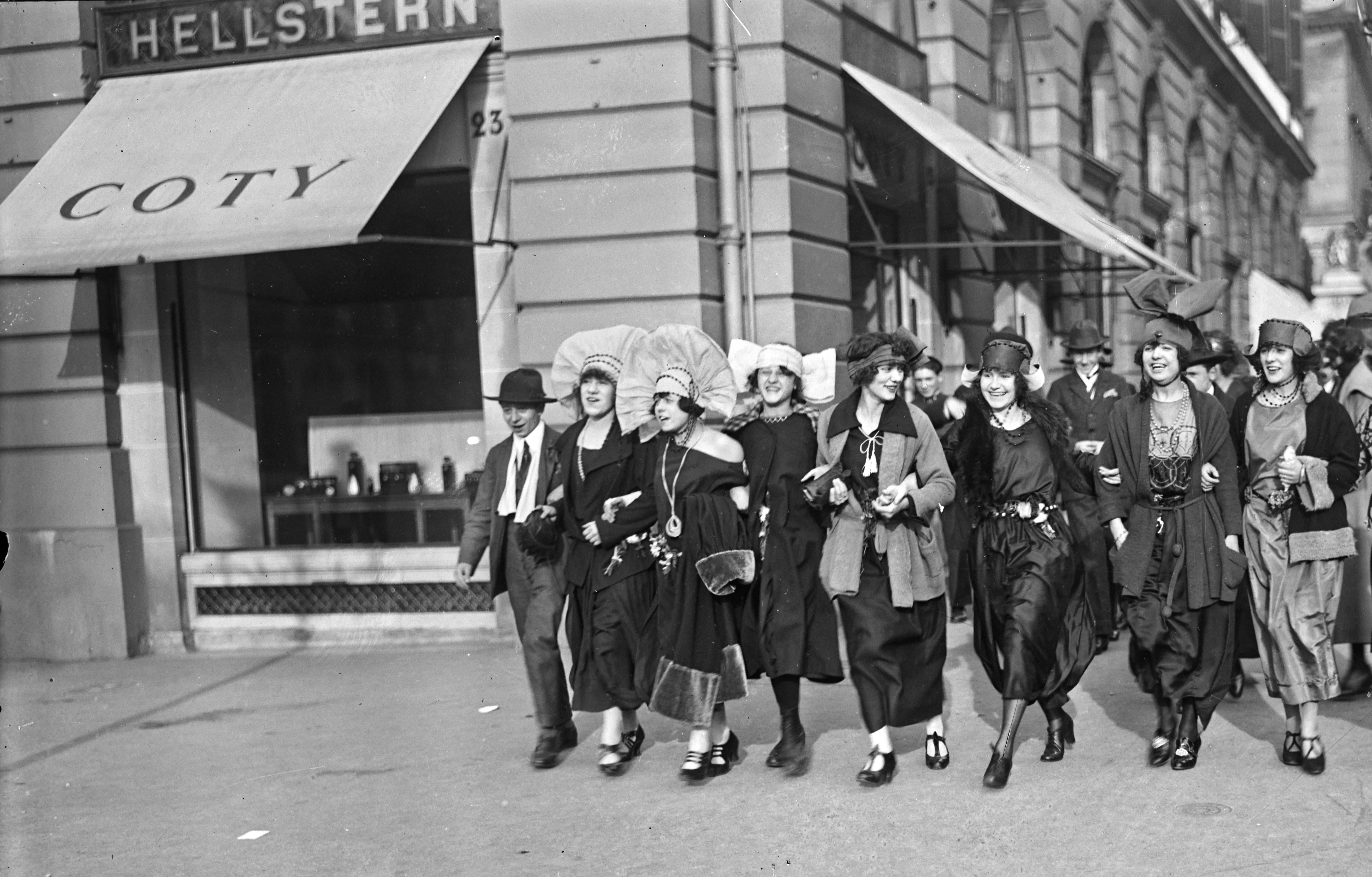 Photo